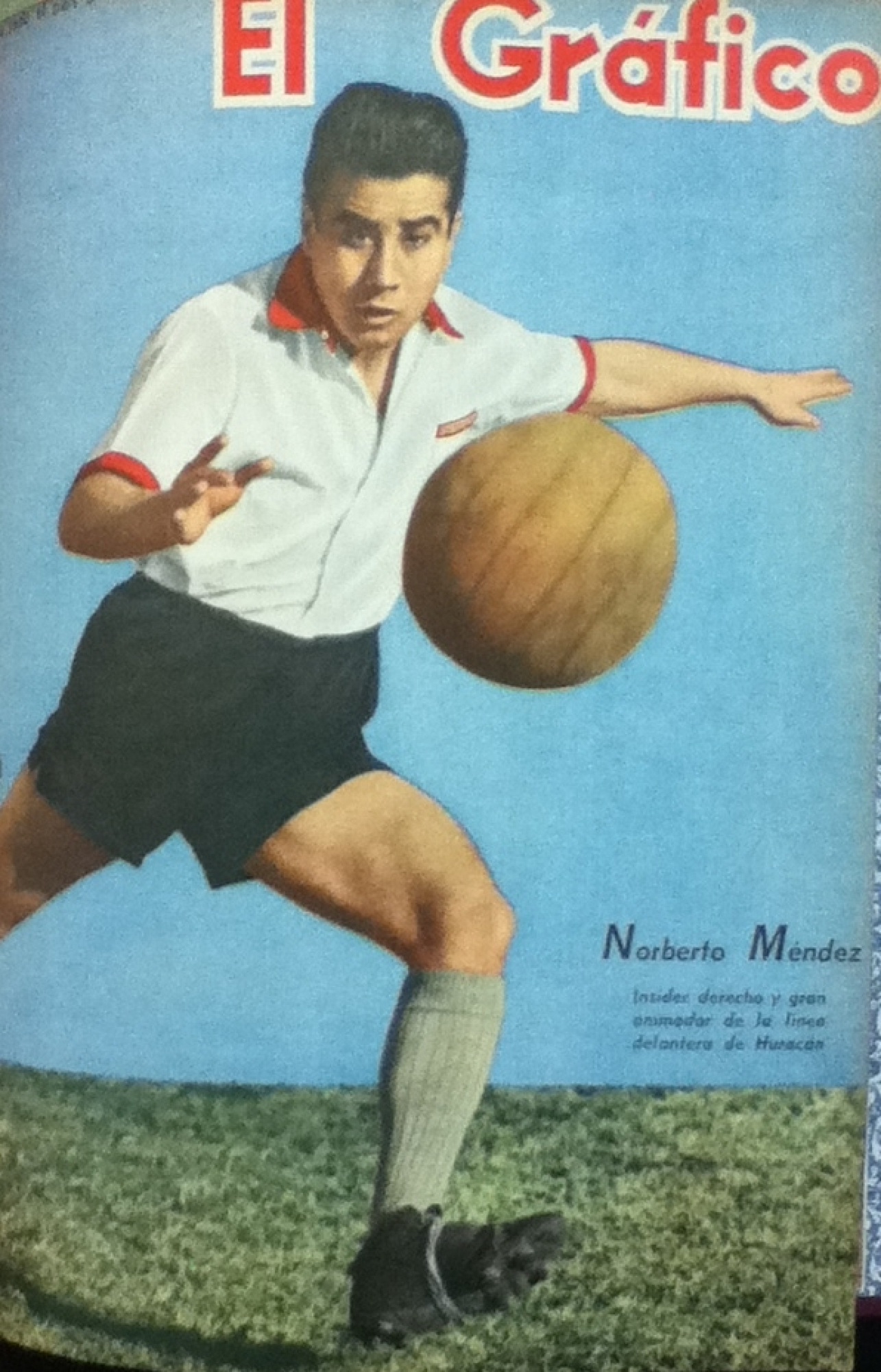 El Grafico del 21 de Julio de 1944. Edicion 1306